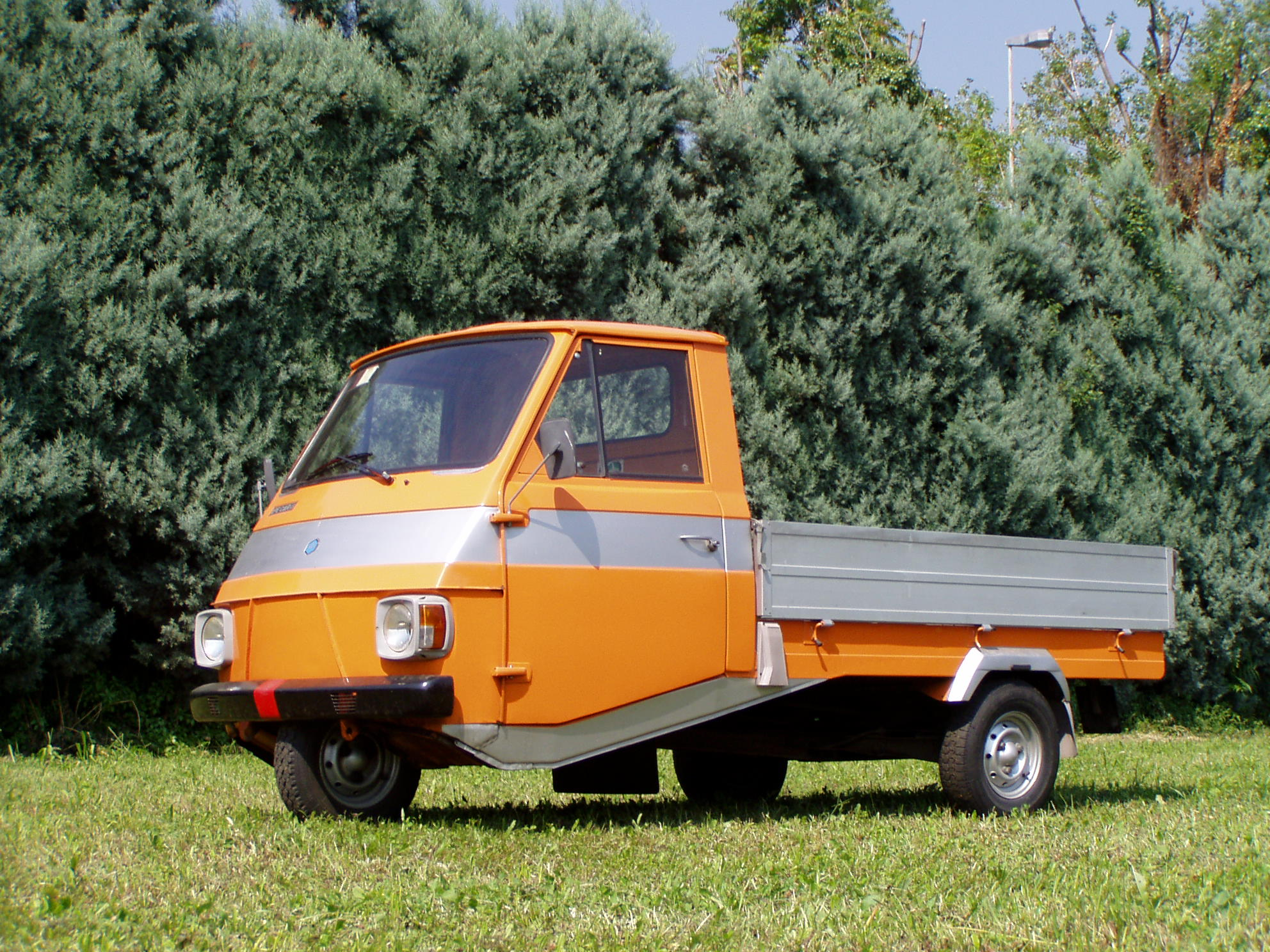 Camilla Giribardi , Piaggio Apecar LS del 1977 , foto scattata da me